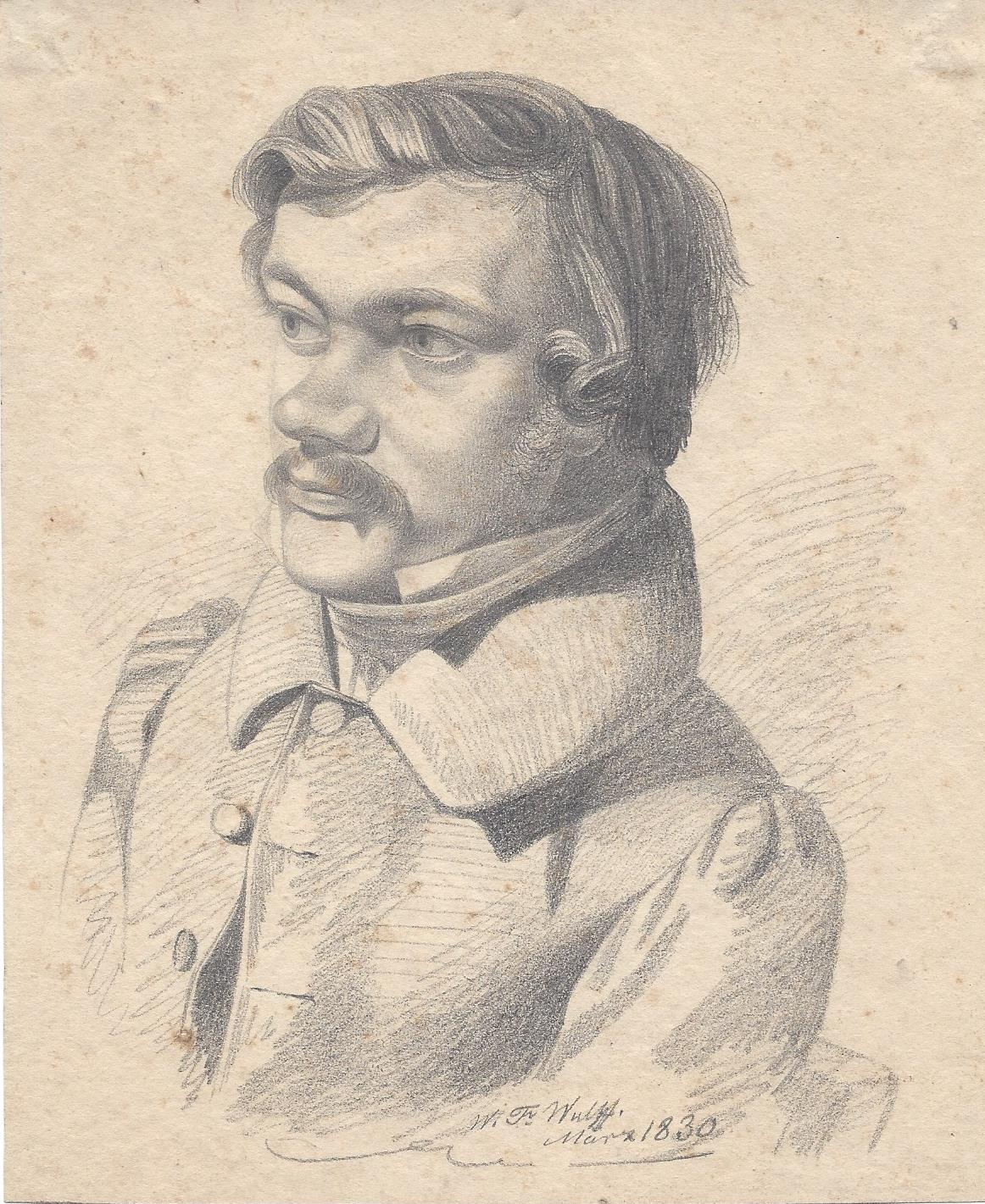 Wilhelm Friedrich Wulff (1808-1882) Selbstporträt, signiert W. F. Wulff und datiert März 1830